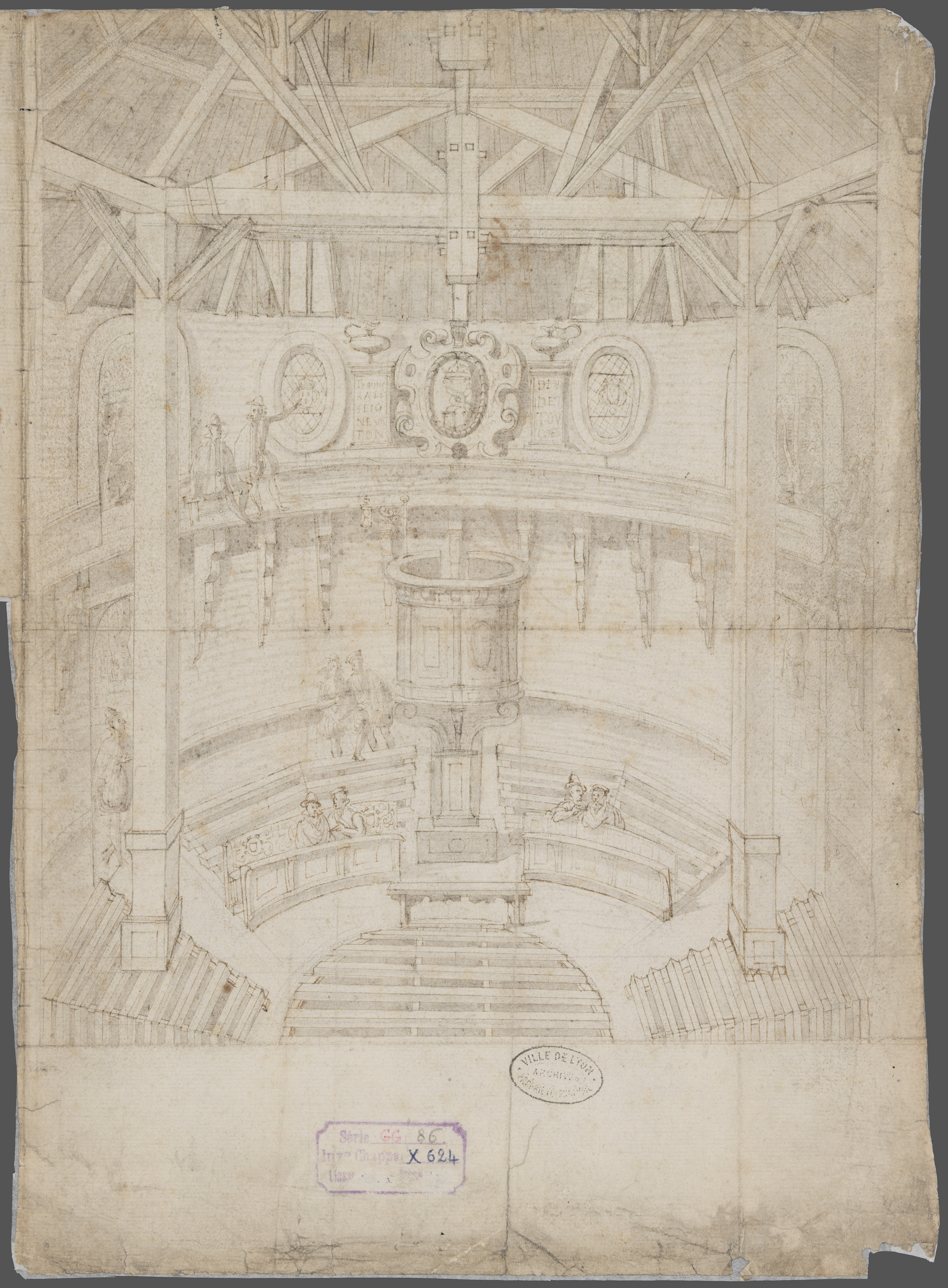 Dessin du temple dit "du Paradis" situé à Lyon et bâti dans les années 1560. plume et encre brune, lavis gris, sur traits à la mine de plomb. Archives municipales de Lyon : GG 86, p. 1 (Inv. Chappe, vol. X, p. 624) Réserve.